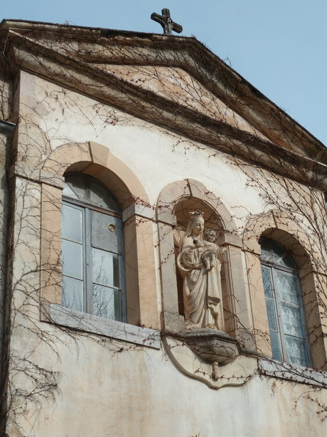 Chartreuse de Méounes-lès-Montrieux, Var, France